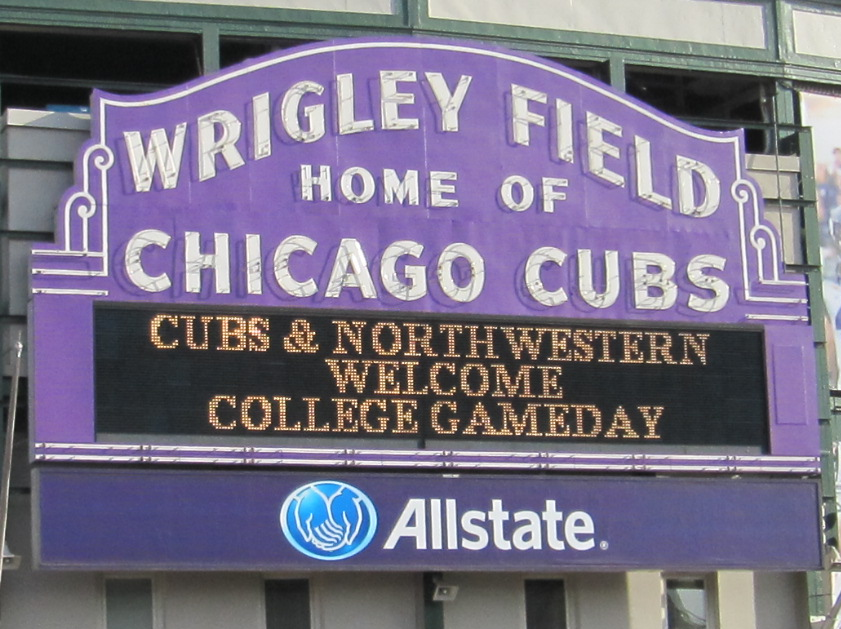 Purple pride!